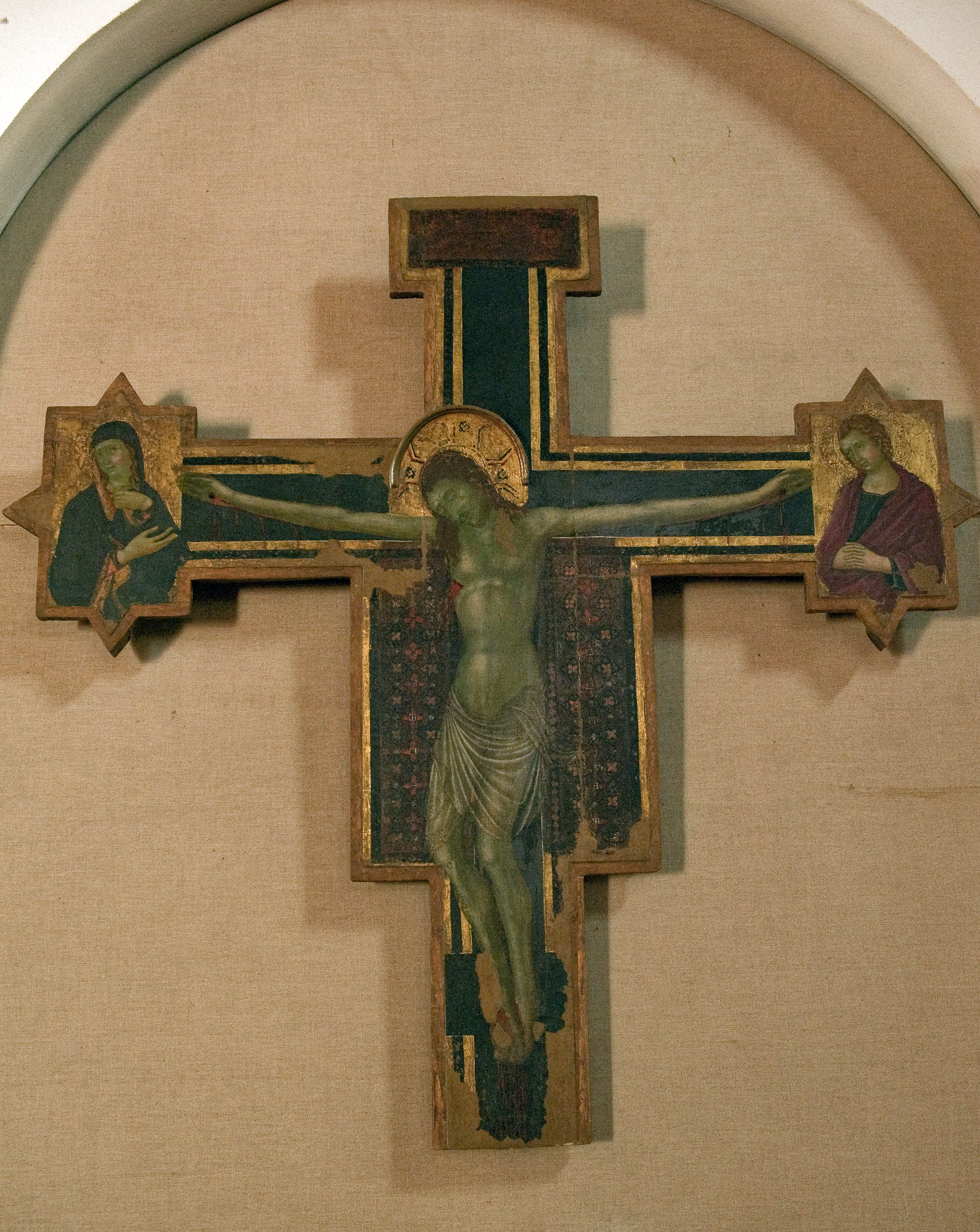 Crocifisso, opera del Maestro di San polo in Rosso (XIV secolo), Propositura di Bibbiena , Arezzo